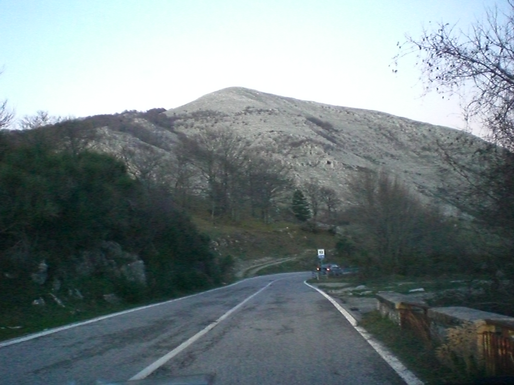 Veduta della SS 166 degli Alburni